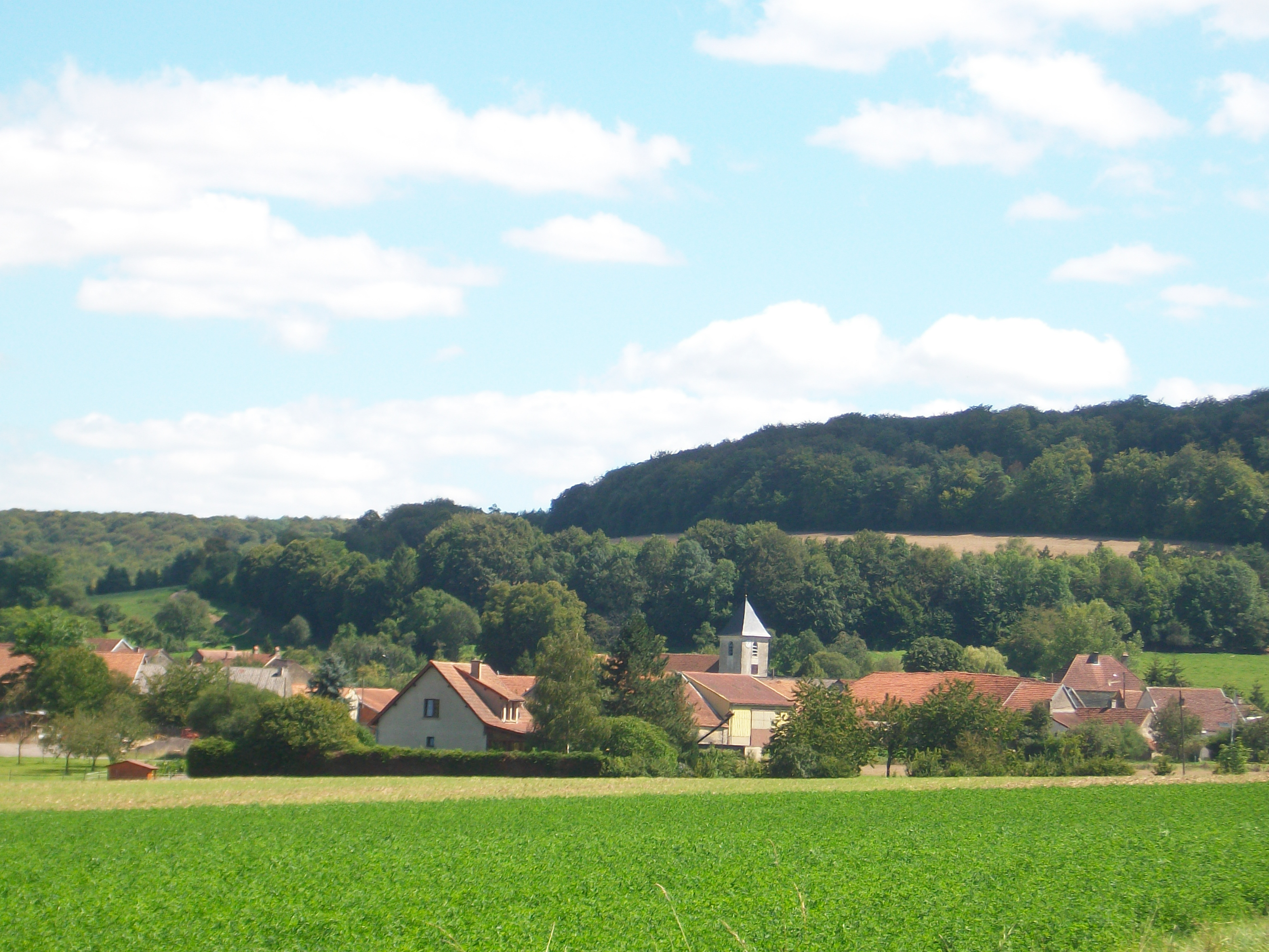 Vue d'ensemble du village.